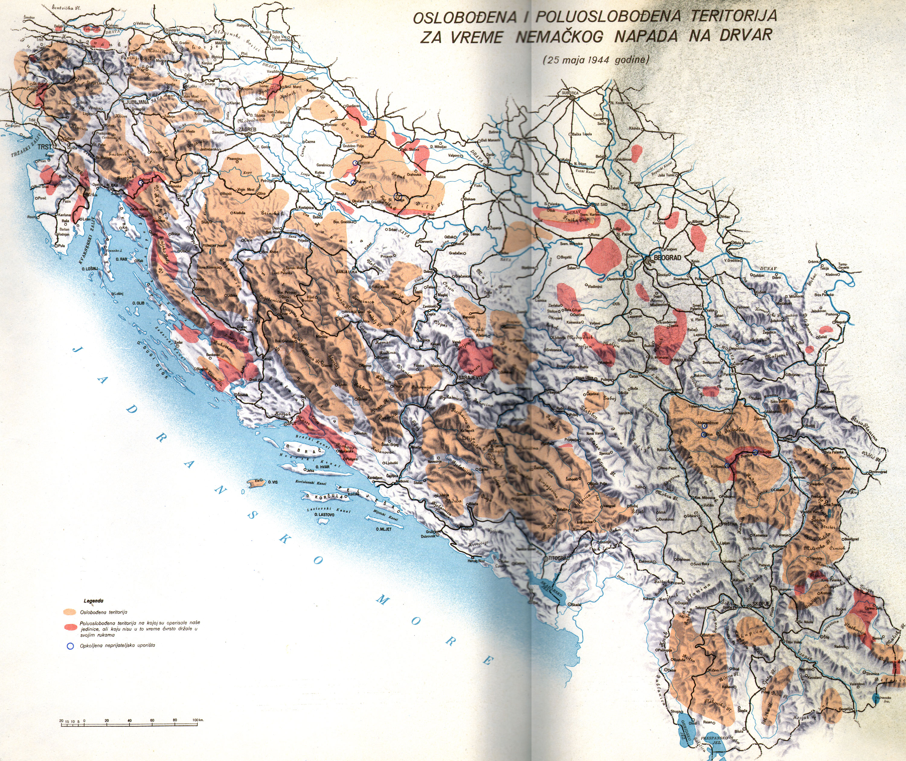 Srpskohrvatski / српскохрватски: Oslobođena i poluoslobođena teritorija za vreme nemačkog napada na Drvar (25 maja 1944 godine)